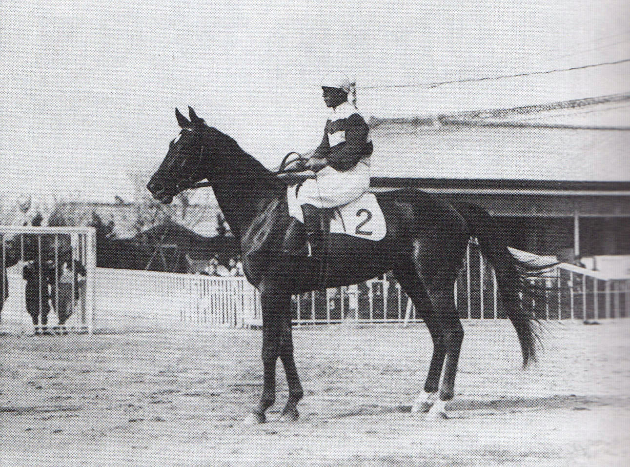 1935年阪神帝室御賞典（春）優勝馬キンチャン（大久保石松騎手）